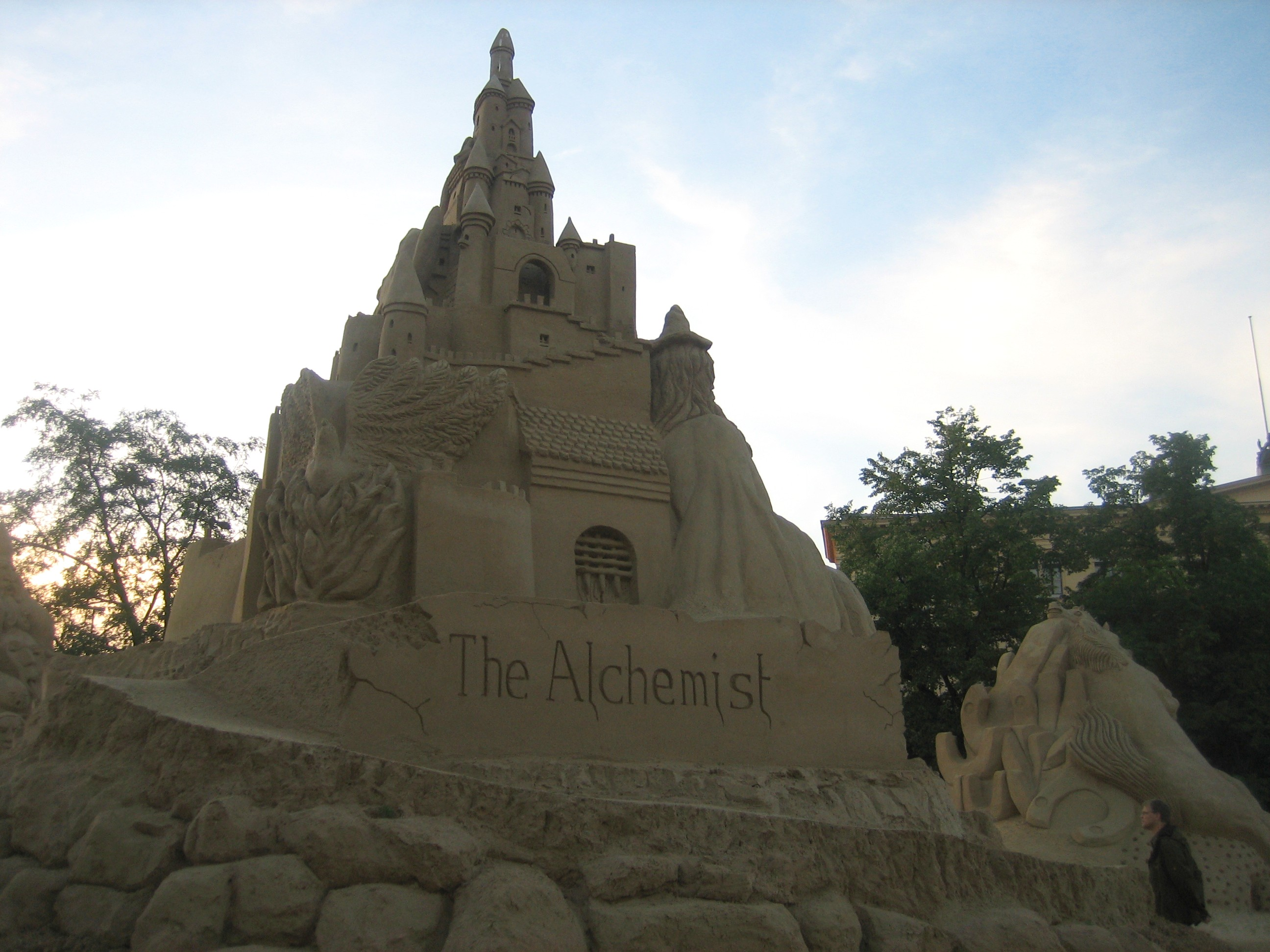 Skulptur the Alchemist auf dem internationalen Sandskulpturenfestival Sandsation Berlin 2008.